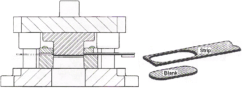 Blanking Tool